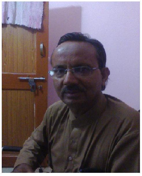 ఇక్బాల్ పాషా